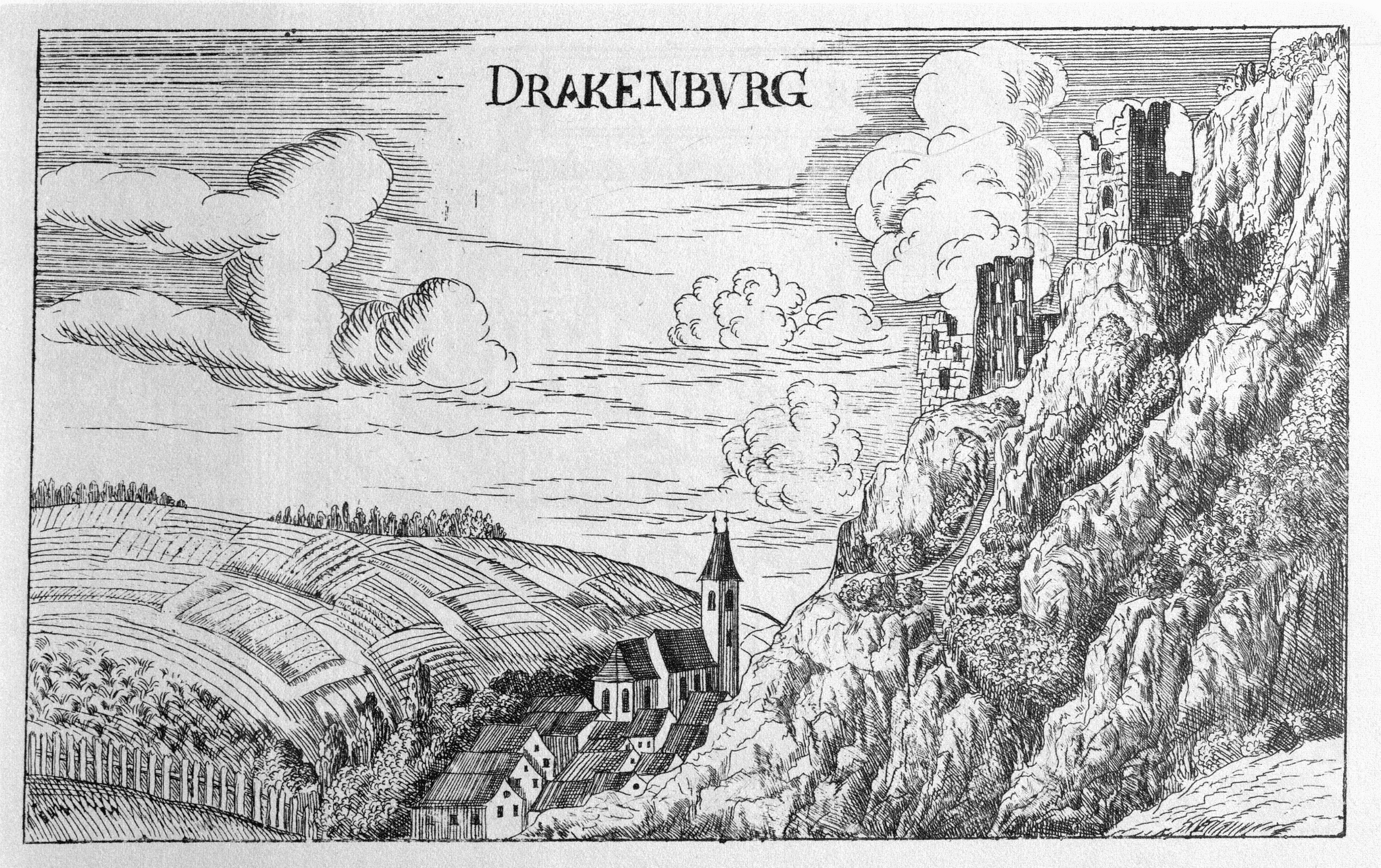 G. M. Vischers Käyserlichen Geographi, Topographia Ducatus Stiriae, Das ist: Eigentliche Delineation / und Abbildung aller Städte / Schlösser / Marcktfleck / Lustgärten / Probsteyen / Stiffter / Clöster und Kirchen / so es sich im Herzogthumb Steyrmarck befinden; Und anjetzo Umb einen billichen Preyß zu finden seynd Bey Johann Bitsch Universitäts Buchhandlern / Auff dem Juden=Platz bey der guldenen Saulen. Graz 1681 Die Nummerierung der Dateien folgt der alphabetischen Reihung der Orte